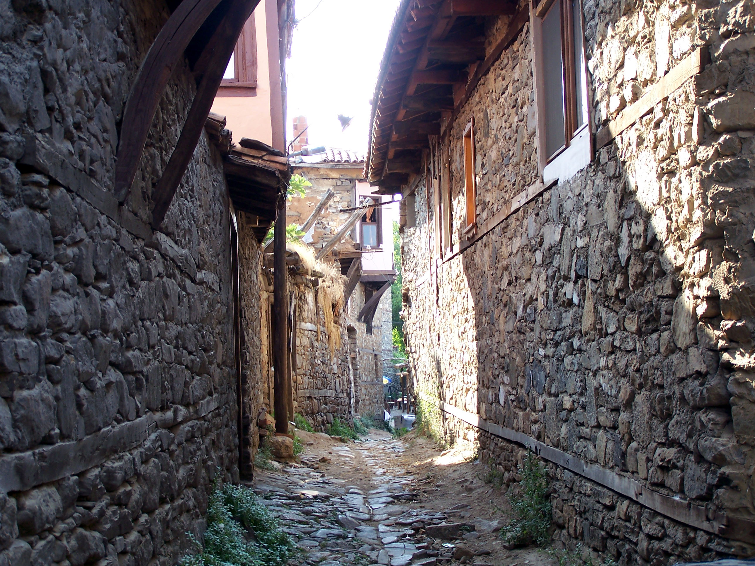 Typical street in Cumalıkızık